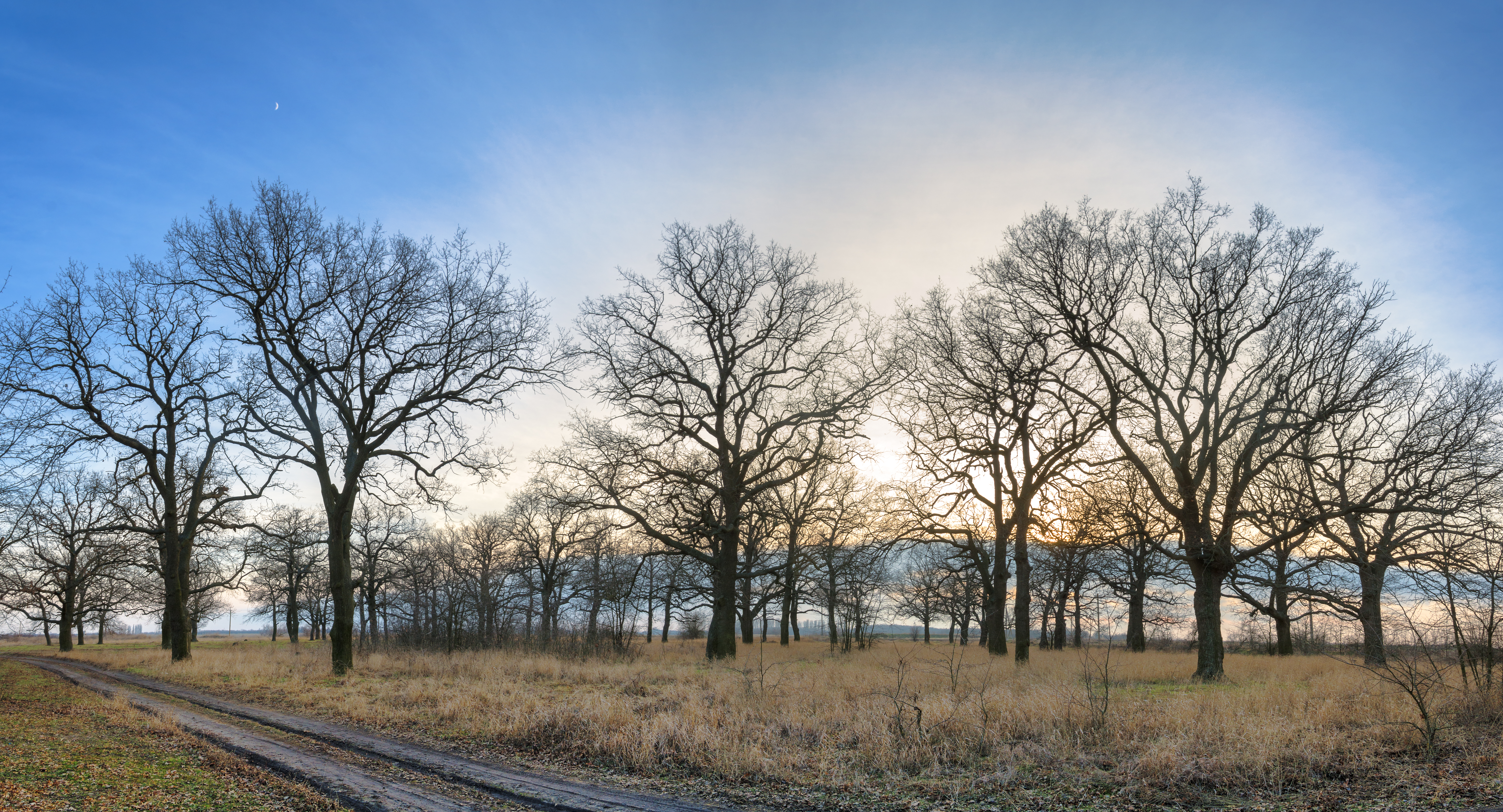 Бехтерський дубовий гай, Голопристанський район, південно-східна околиця с. Бехтери